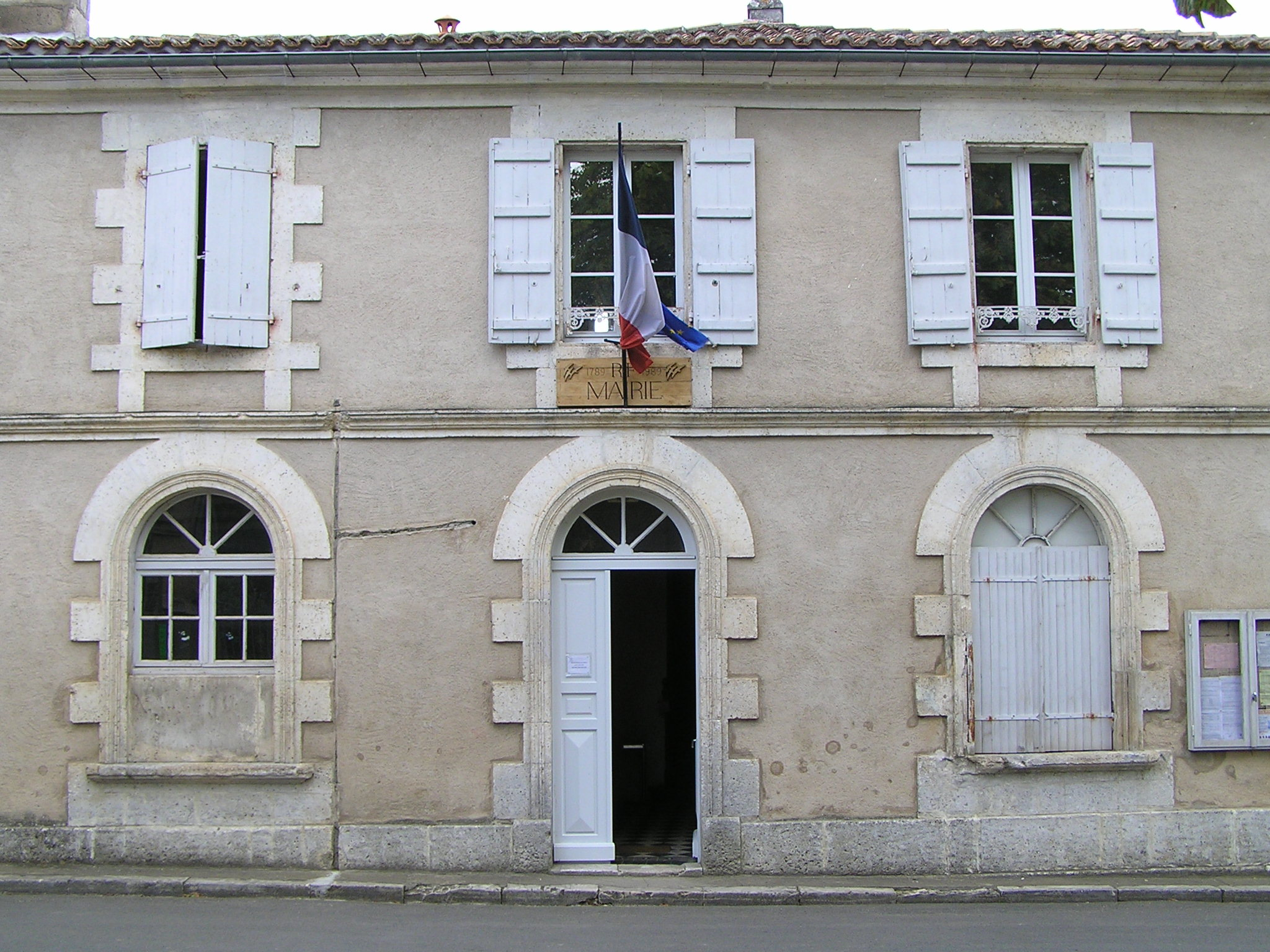 mairie de Nanclars